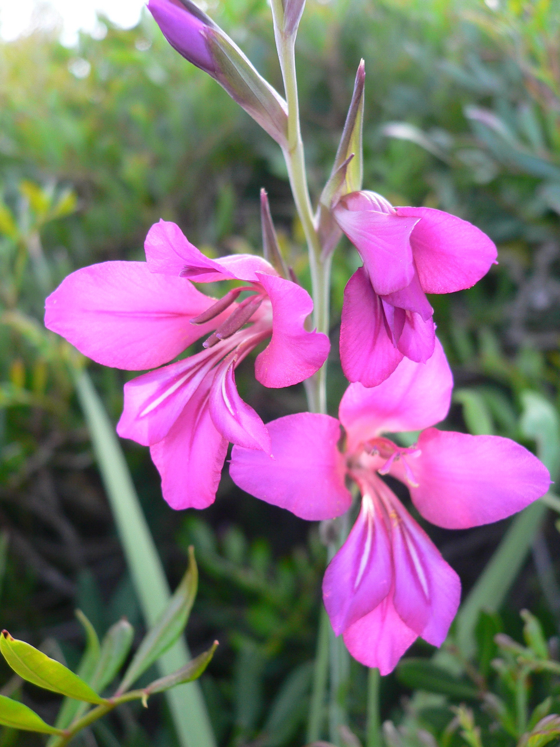 Fiore di Gladiolus communis